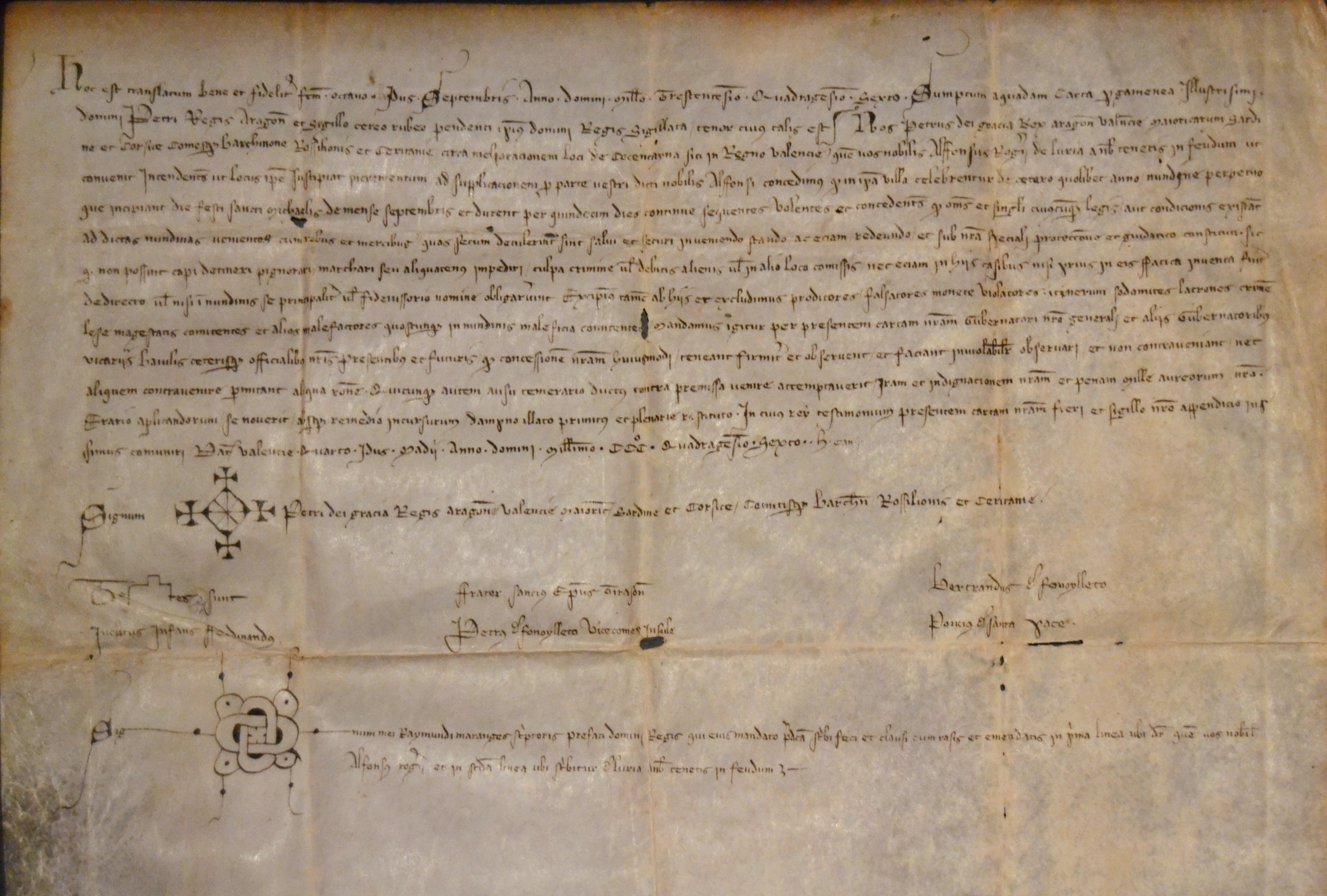 Privilegi de la fira de Tots Sants de Cocentaina. El privilegi per a celebrar una fira a Cocentaina va ser concedit el 12 de maig de 1346 pel rei Pere el Cerimoniós a petició del seu oncle Alfons Roger de Llúria, senyor de la vila, segons el pergamí que es conserva a l'ajuntament. Una de les concessions que mostrava la rellevància de l'esdeveniment a l'època va ser la Pau de Fira i la franquícia del comerç, pel qual s'atorgava un règim jurídic especial sota la tutela directa del rei. Així, en el document s'especifica que totes les persones que anaren a la fira gaudirien d'un salconduit que assegurava les mercaderies i altres interessos al llarg del viatge d'anada i de tornada i de la seua estada a Cocentaina.